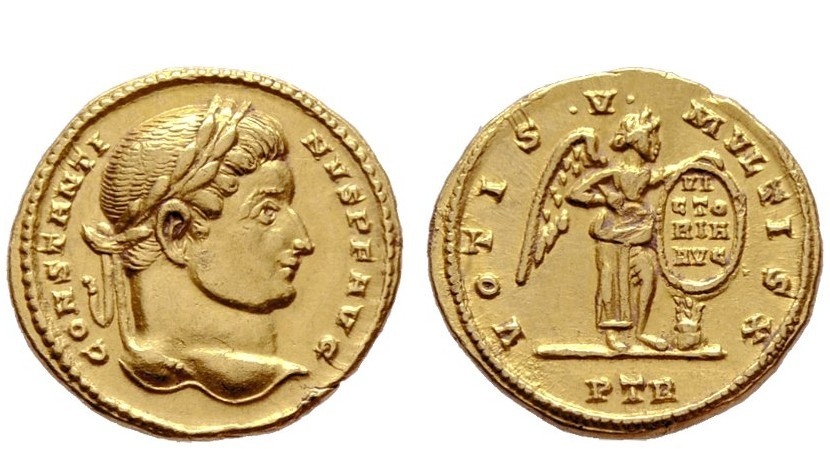 Constantinus I. (306-337) Solidus (4,35g), Trier, geprägt von 310 bis 313 n. Chr. Vorderseite: CONSTANTI-NVS P F AVG, Kopf mit Lorbeerkranz n.r. Rückseite: VOTIS • V • - MVLTIS X / P TR (im Abschnitt), Victoria mit Schreibgriffel v.v., Kopf n.r., hält Schild auf Palmstumpf, darauf VI / CTO / RIA / AVG.